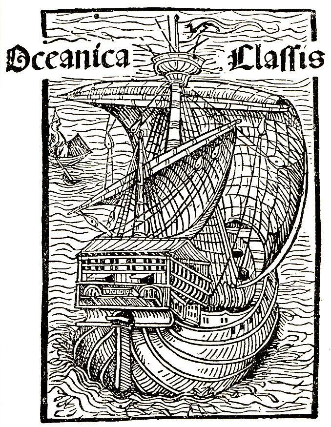 Nau Santa Maria de Cristóvão Colombo. Gravura sobre madeira, 20,6 x 14,8 cm. Carlo Verardi (1440-1500). Ilustração de Historia Baltica, Basileia, 1494, Suíça.